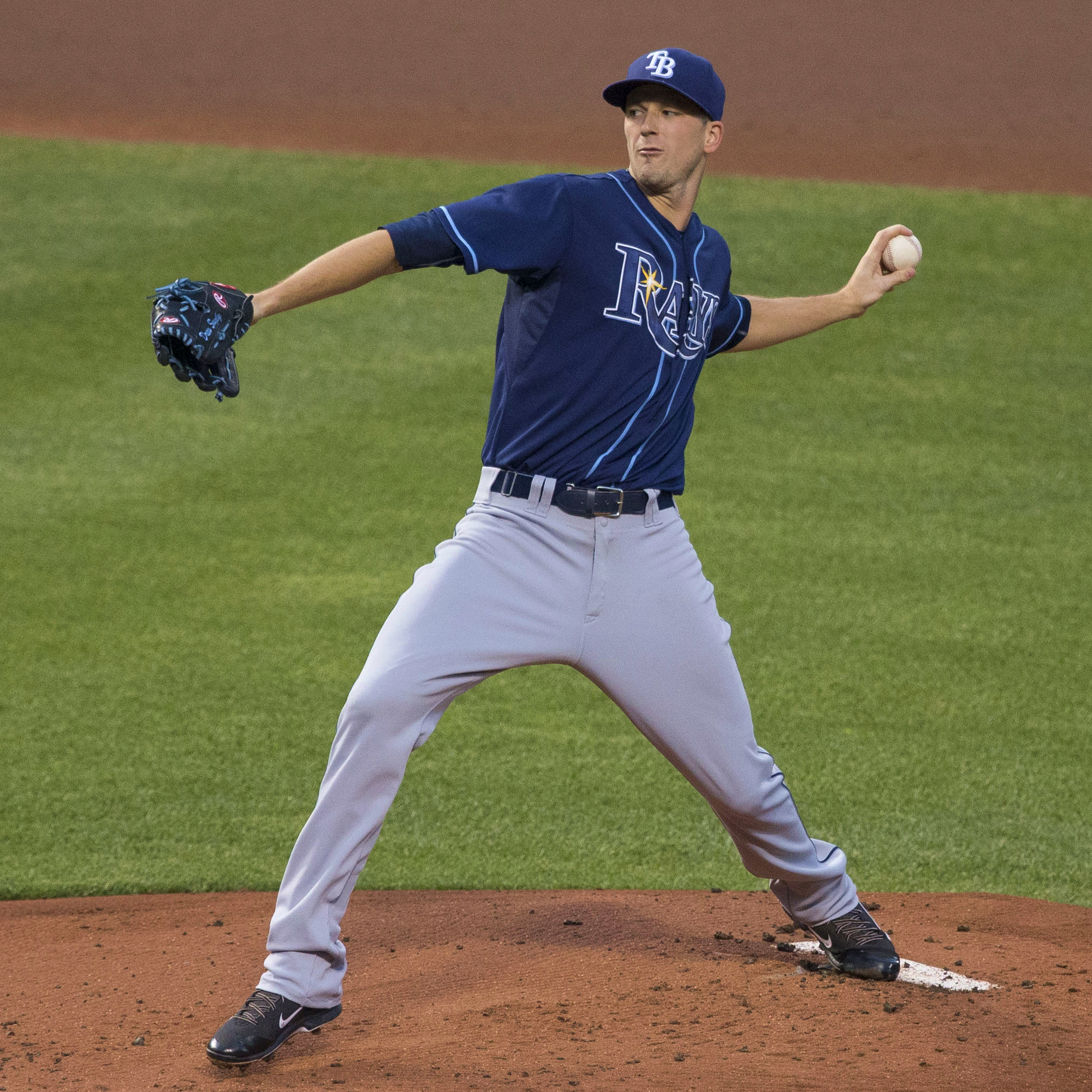 Drew Smyly